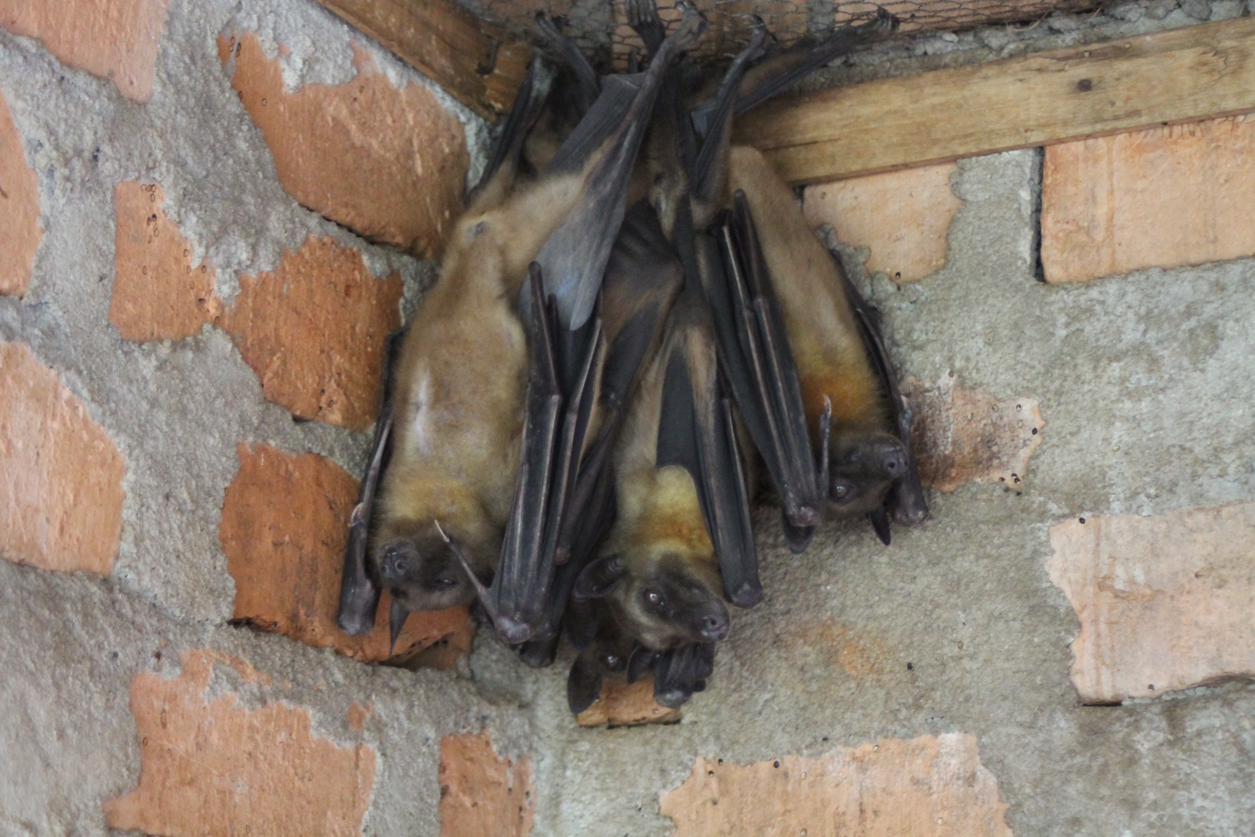 Eidolon dupreanum, Peyrieras